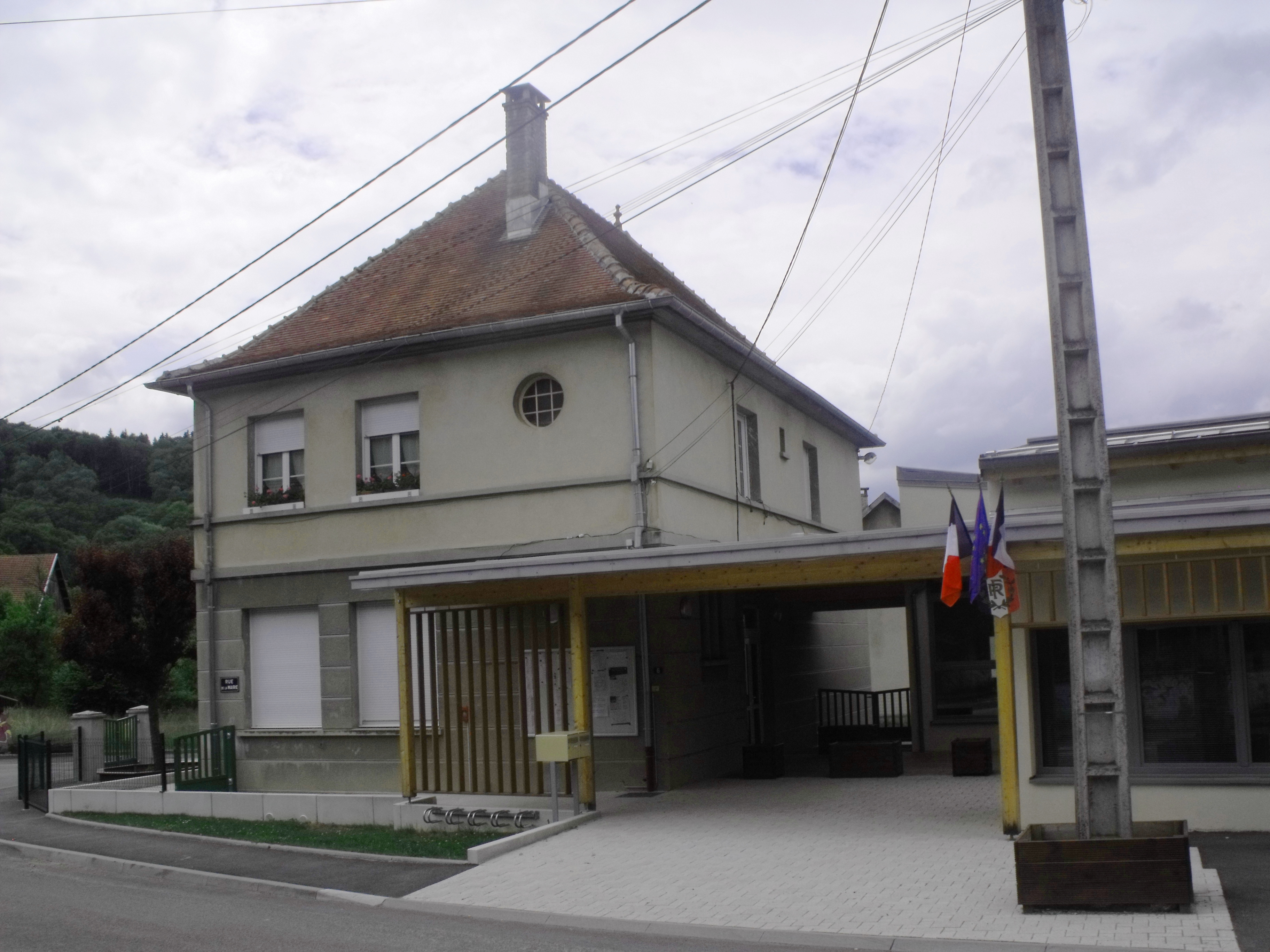 Mairie de Rémondans-Vaivre, Doubs, France